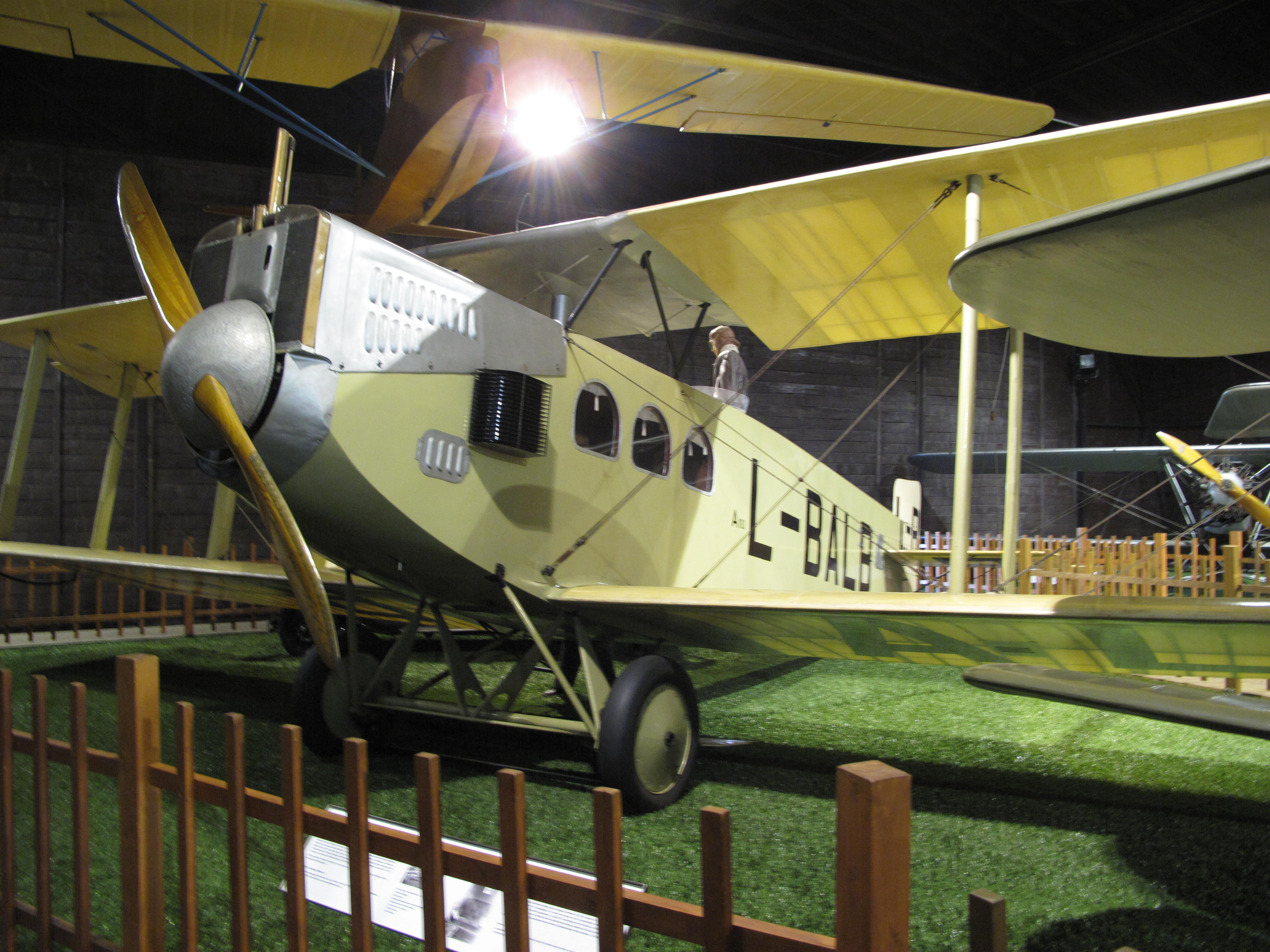 Aero Vodochody A-10 - L-BALB ; Letecké muzeum Kbely